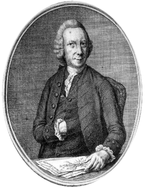 Portret van David de Gorter. Zijn linkerhand rust op tekeningen met de volgende opschriften: Gorteria Ciliaris, Gorteria Squarrosa, Gorteria Personata